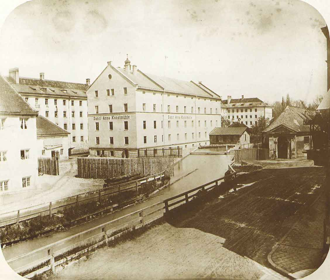 Die St. Anna Kunstmühle in der Pilotystraße in München. Die Ansicht beginnt auf der rechten Seite mit der abgeschnittenen nur ca 3 Meter breiten Pilotystraße, folgend ein Trackt der ehemaligen Kaserne, dieses wird bis zur Zersörung im 2. Weltkrieg als Garage dienen. Danach der Kainz-Mühlbach, anschließend das über 4 Stockwerke hohe Mühlengebäude selbst. Dieses wird auch ein Raub der Flammen im Krieg. Unmittelbar dahinter, auf dem Foto nicht einsehbar, der Köglmühlbach, und am linken Rand, Mitte, ein Eckgebäude an der Hofgartenstraße, und zur Köglmühle gehörig, dahinter ein Teilstück der ehemaligen Hofgartenkaserne.